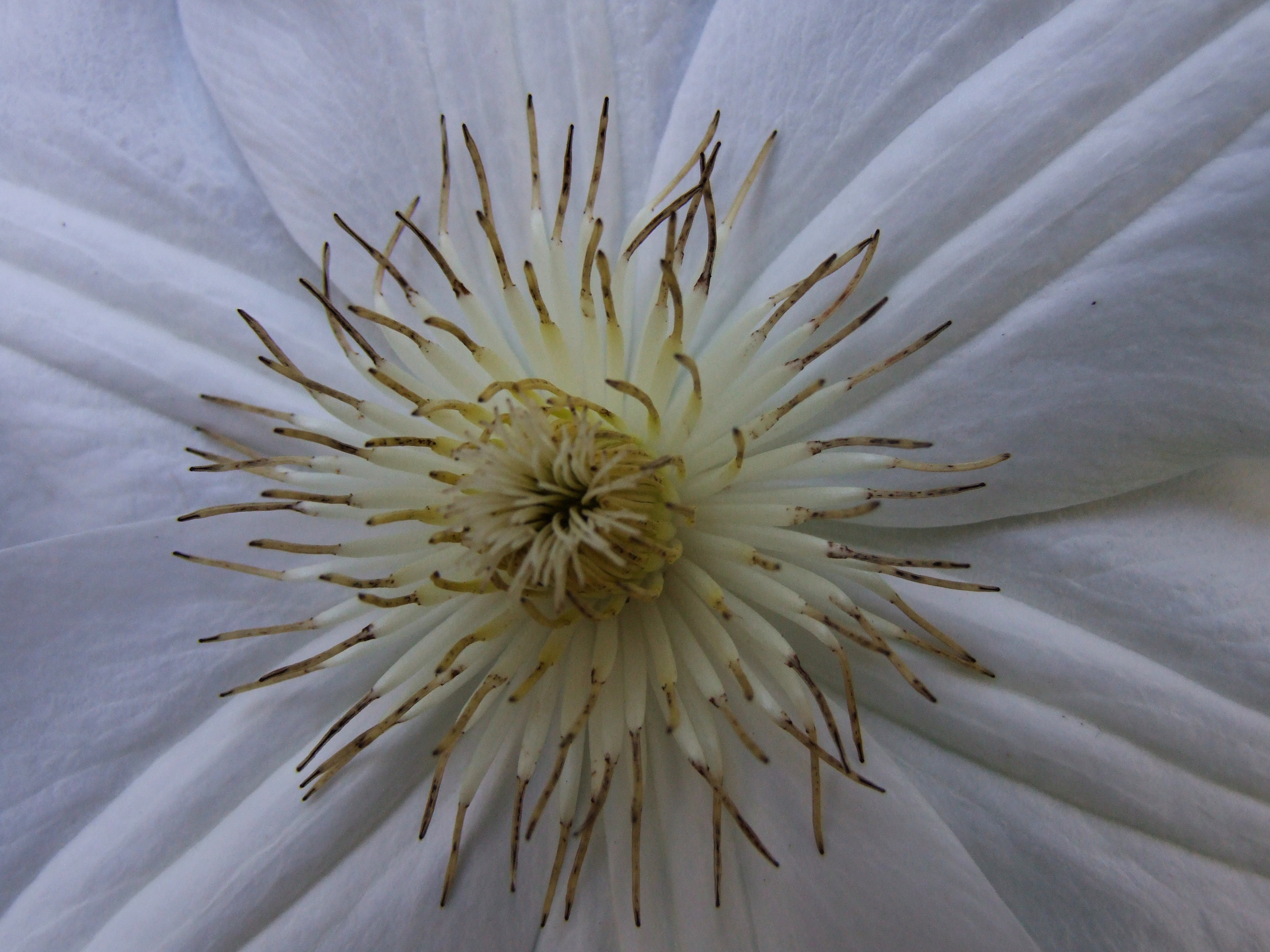 Clematis cultivars (staminodium)